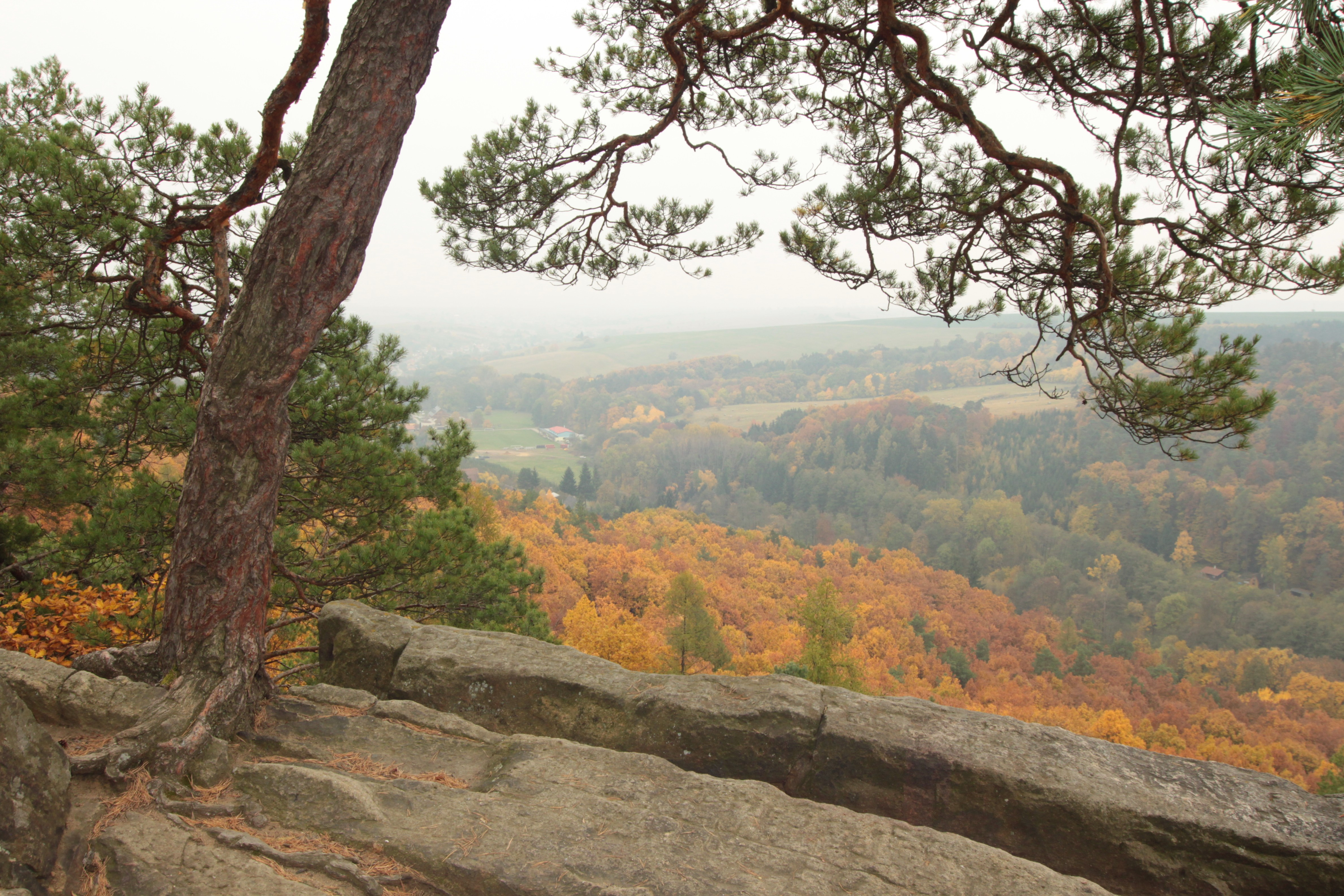 Výhled na pohoří Chřiby